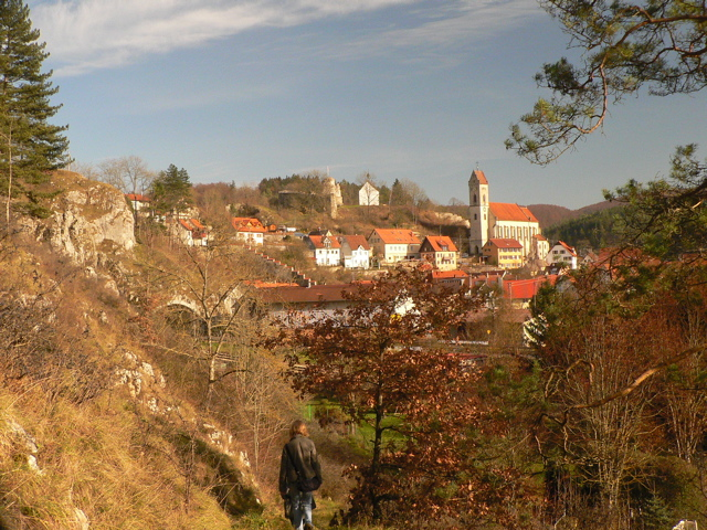 Veringenstadt, Baden-Württemberg, Deutschland: Wanderweg nach Veringenstadt